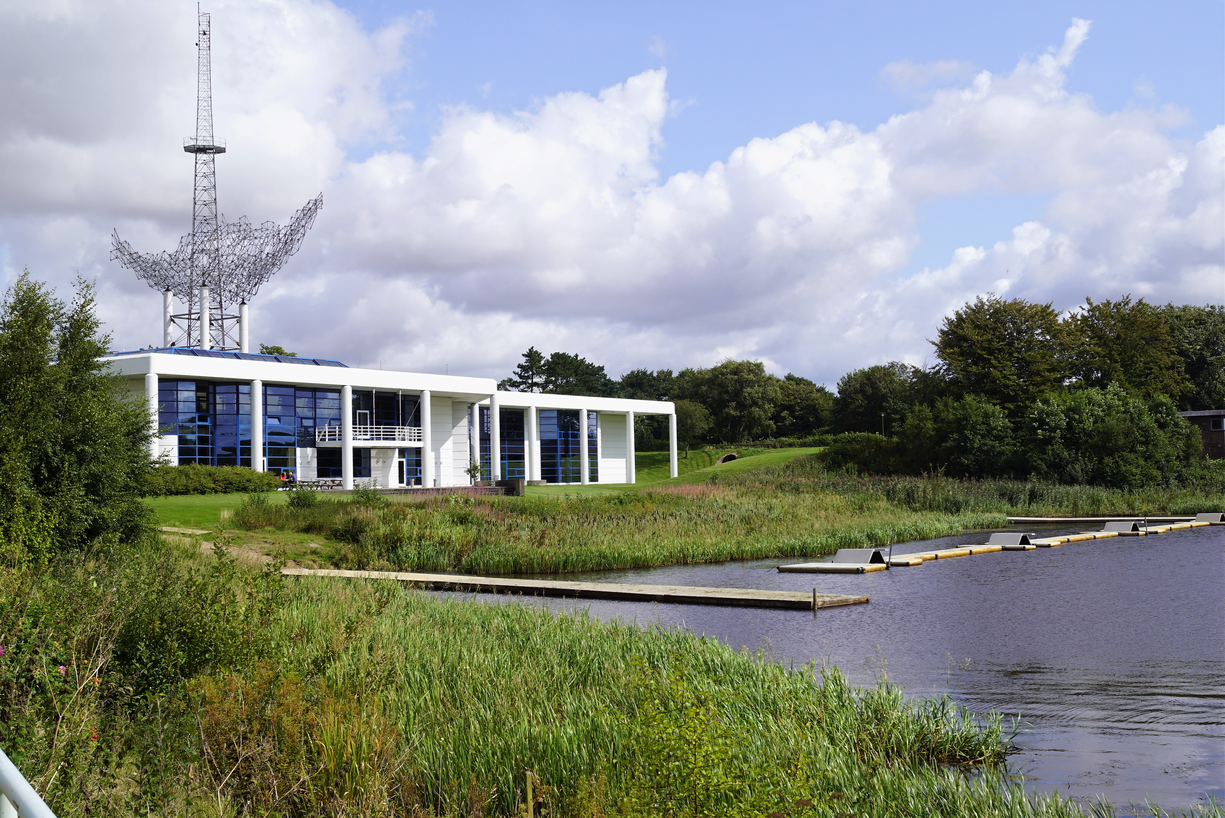 TV Midtvests bygning ved Vandværkssøen i Holstebro